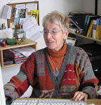 Am Arbeitsplatz